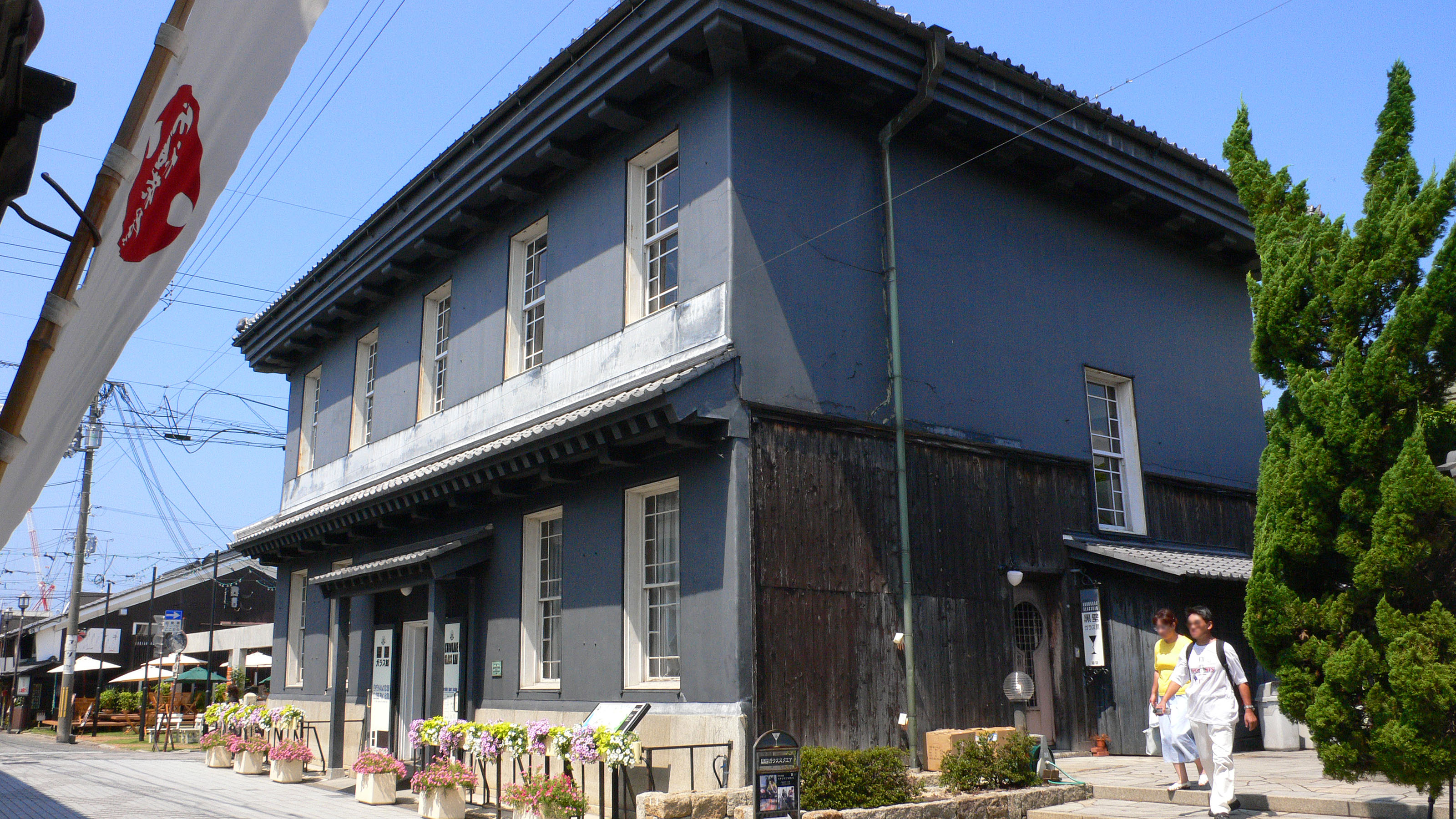 Kurokabe Square in Nagahama, Shiga, Japan